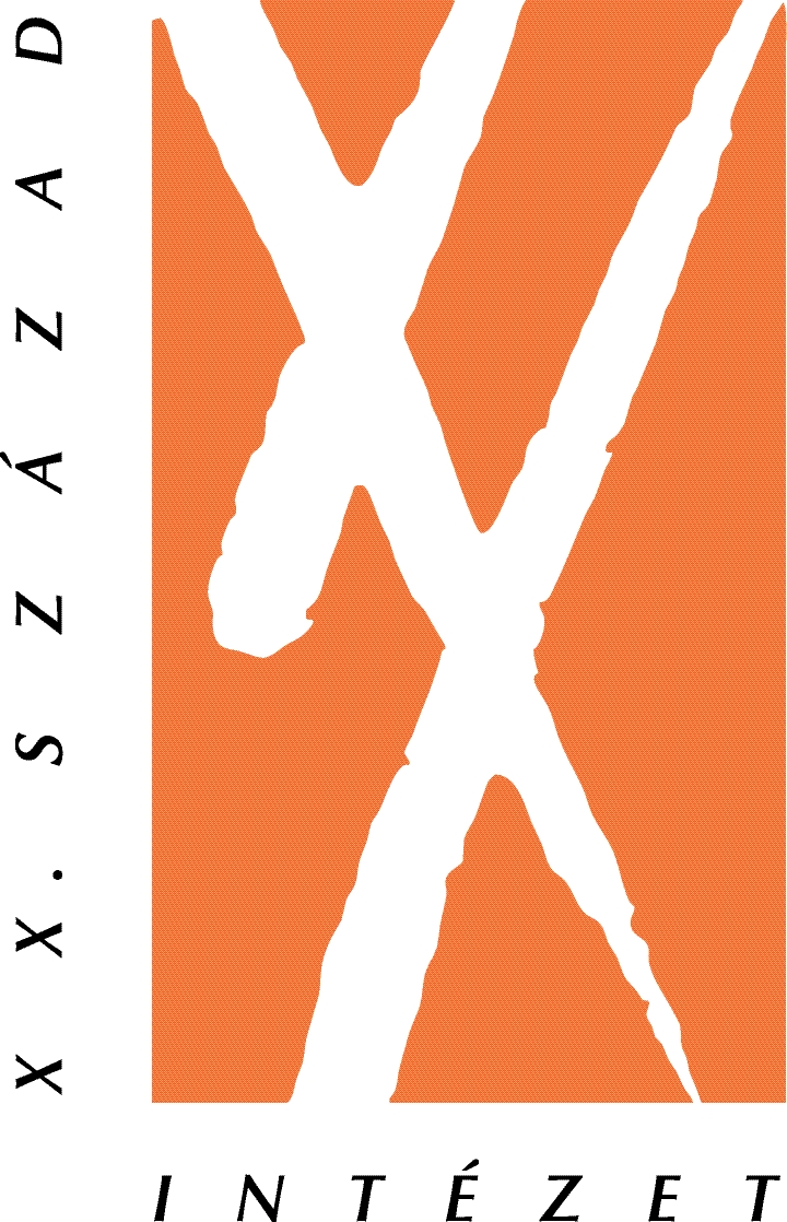 XX. Század Intézet logo